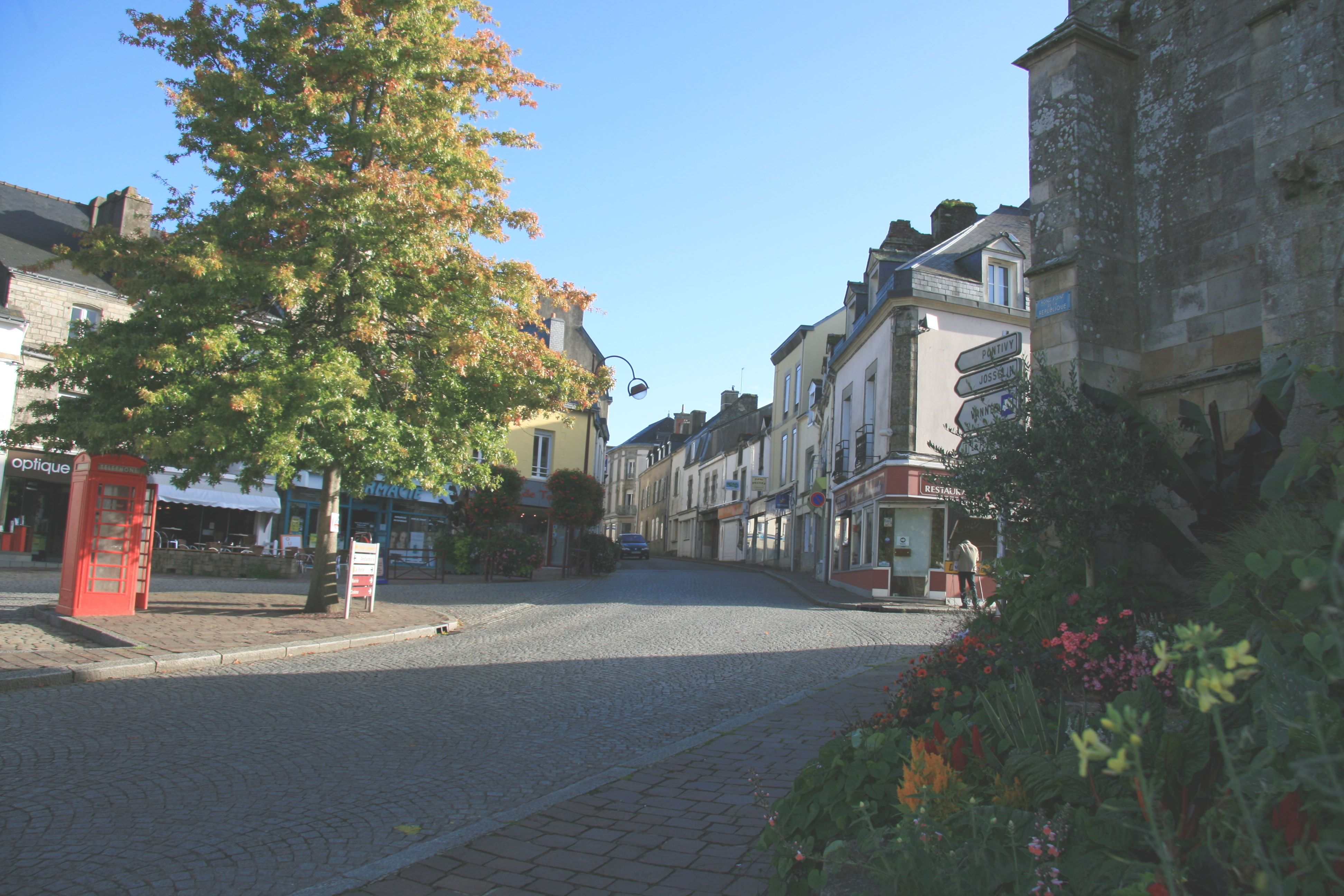 Place de la République - Locminé - Morbihan - Bretagne